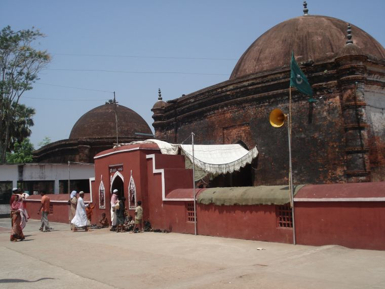 হযরত খানজাহান আলী (রাঃ) এর মাজার ভবন। এটি বাংলাদেশের খুলনা বিভাগের বাগেরহাট জেলায় অবস্থিত পঞ্চদশ শতকের একটি ইসলামিক নিদর্শন। রাজধানী ঢাকা থেকে এর অবস্থান ১৭৫ কিমি দক্ষিন পশ্চিমে।